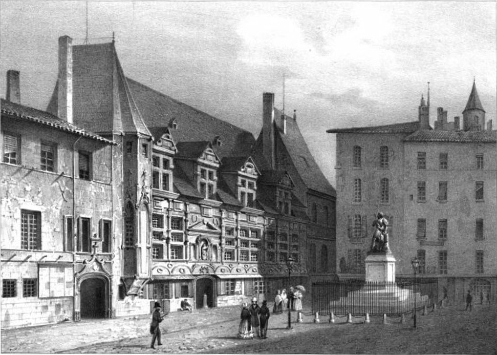 Album du Dauphiné - tome IV, litographie de Palais de Justice, Place St André, Grenoble